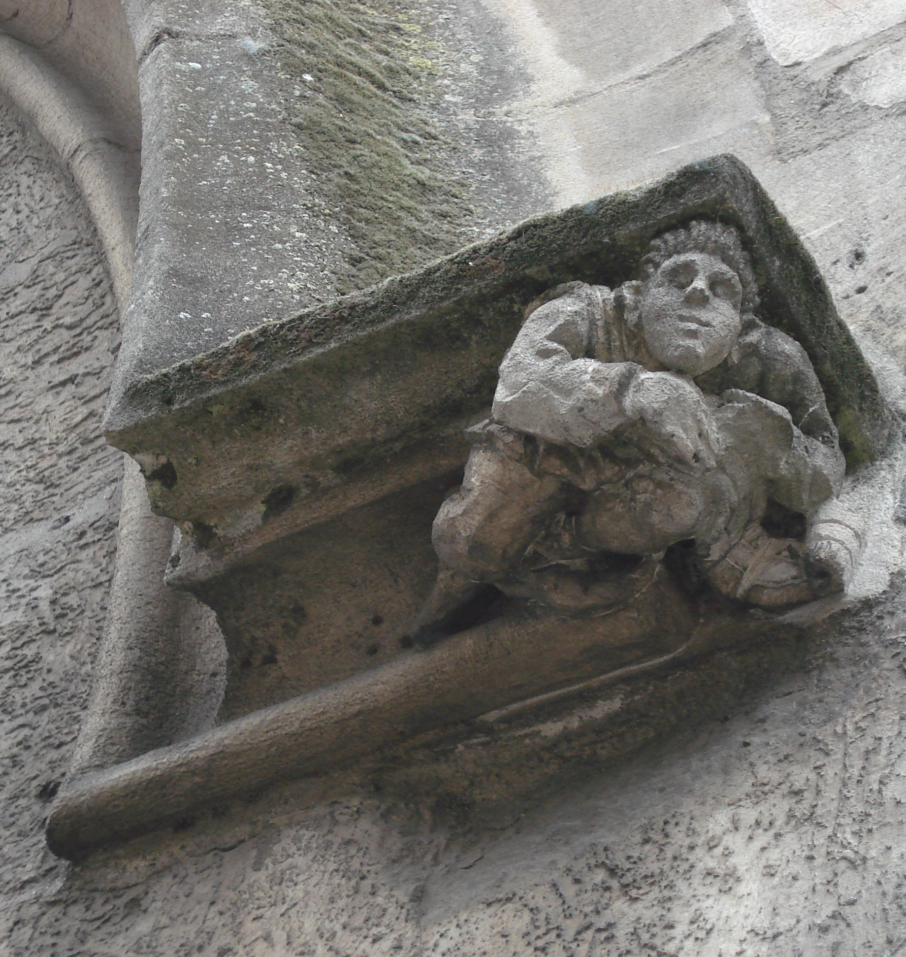 Sculpture archivolte du beffroi d'Amiens